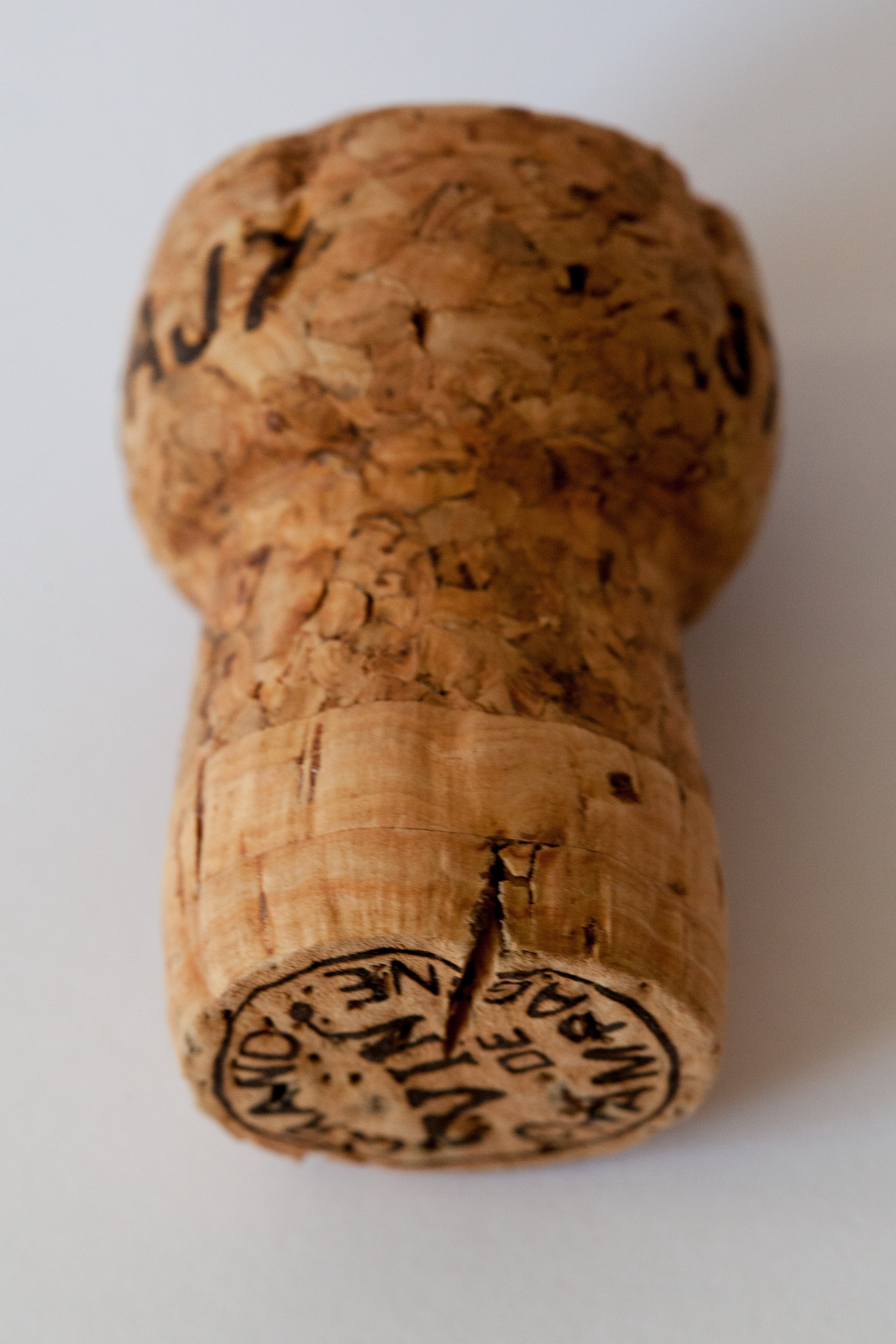 Korken für Champagnerflasche